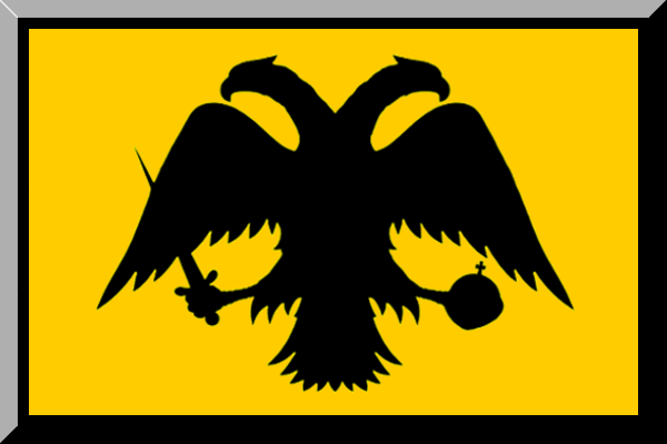 Φανταστική απεικόνιση του βυζαντινού αετού